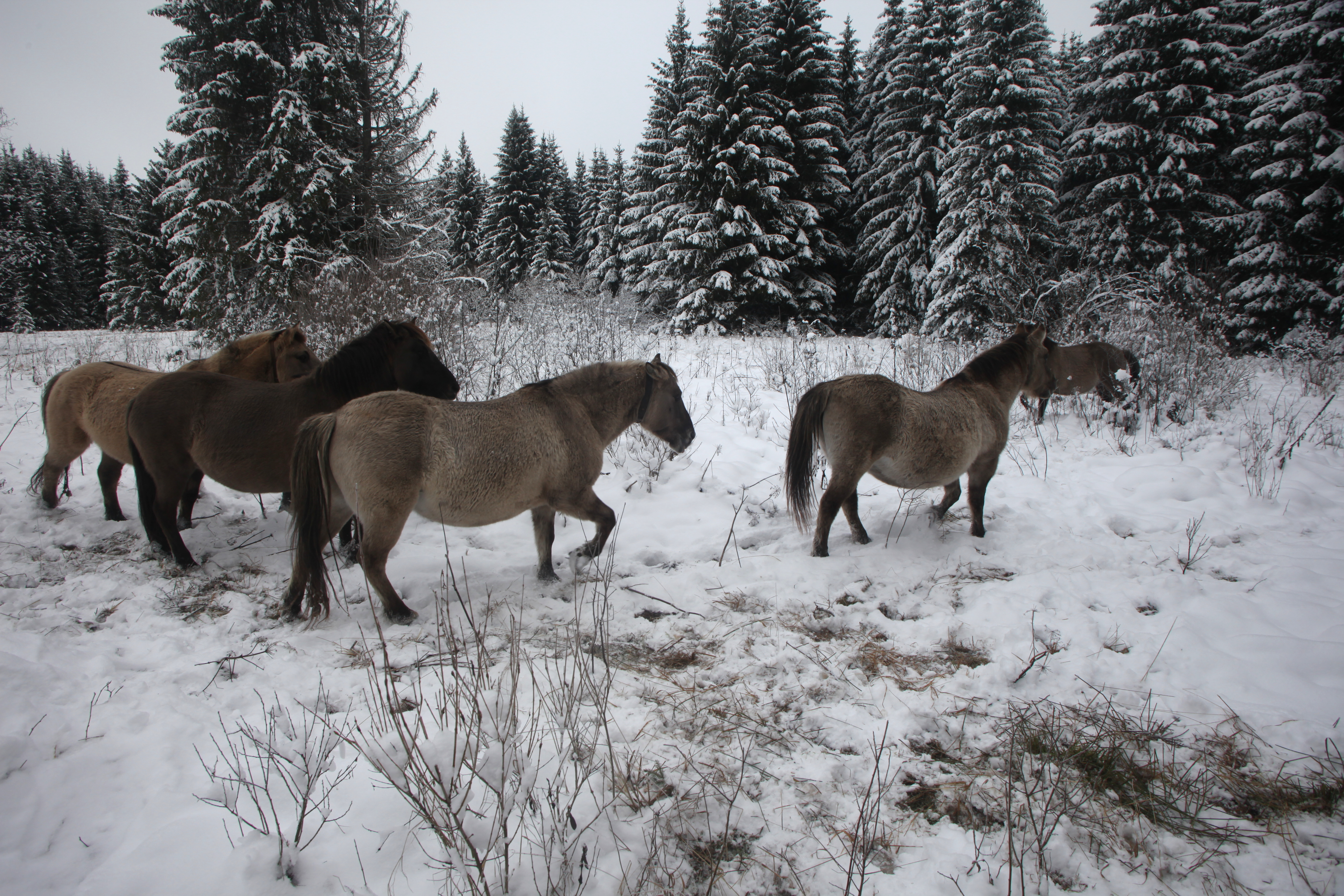 Les koniks au marais sous la neige le jour de la transhumance d'automne.